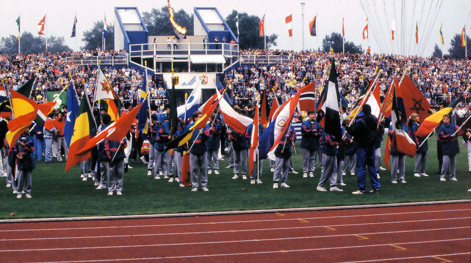 Universiade Duisburg 89